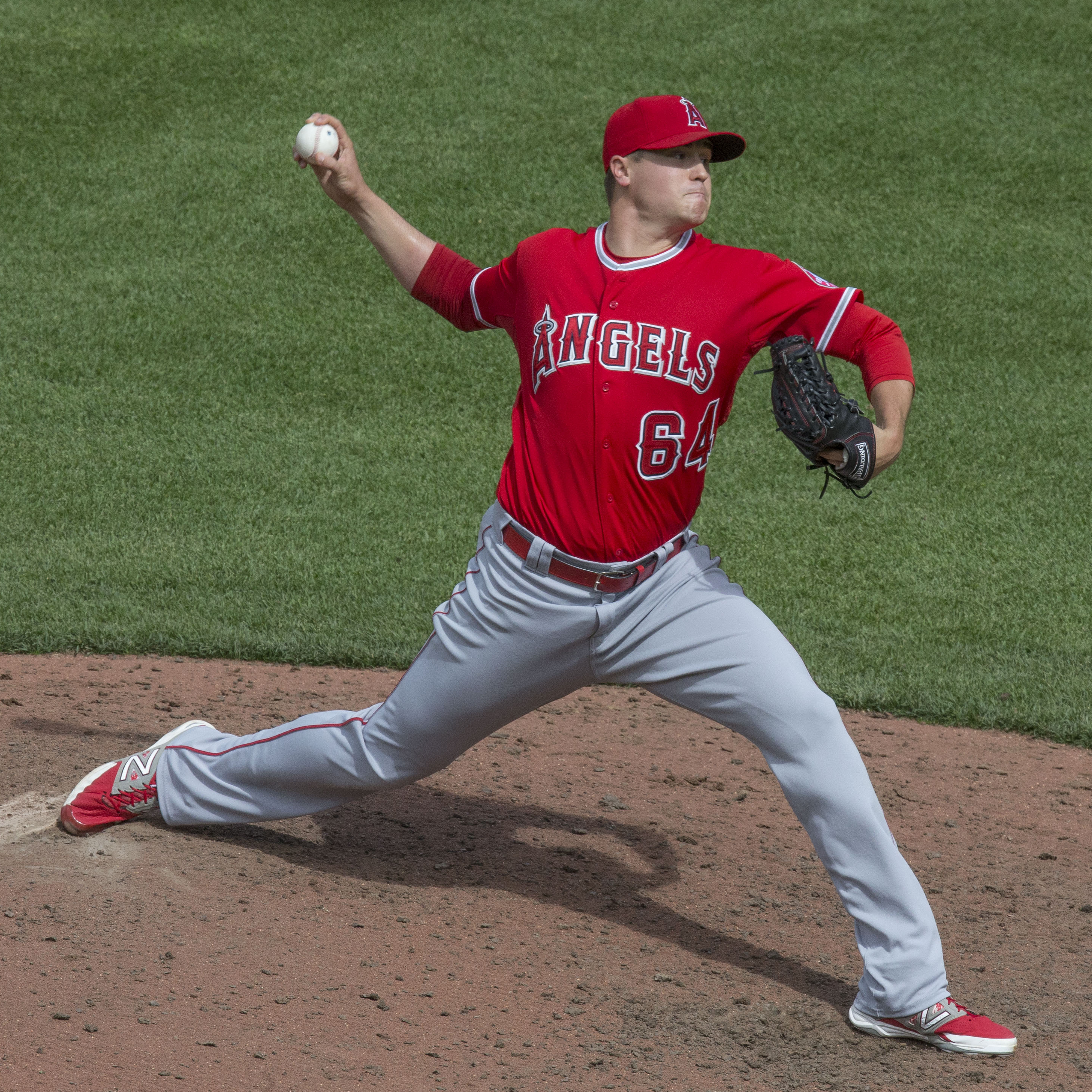 Mike Morin